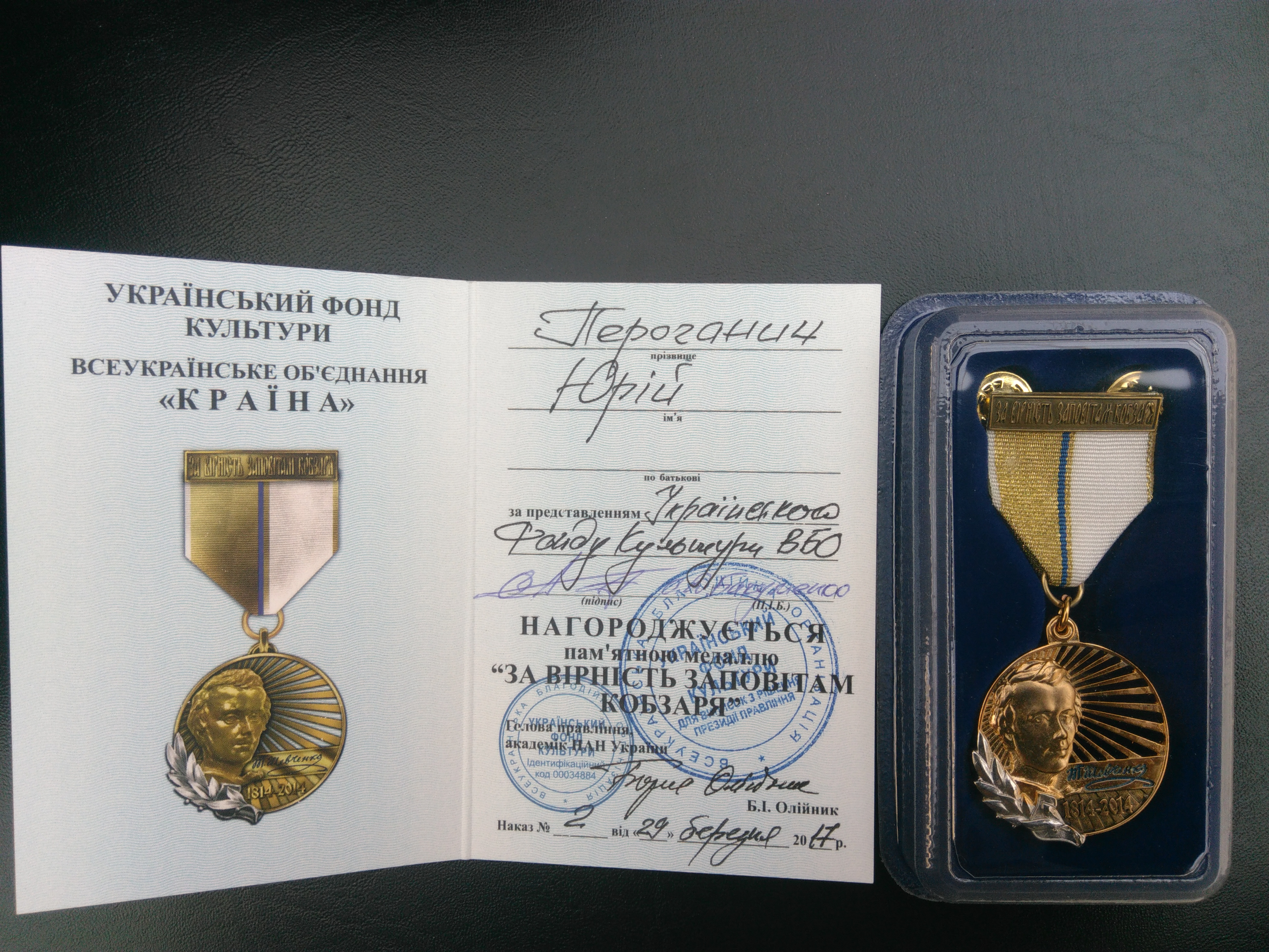 Найвища відзнака Українського фонду культури з підписом Бориса Олійника